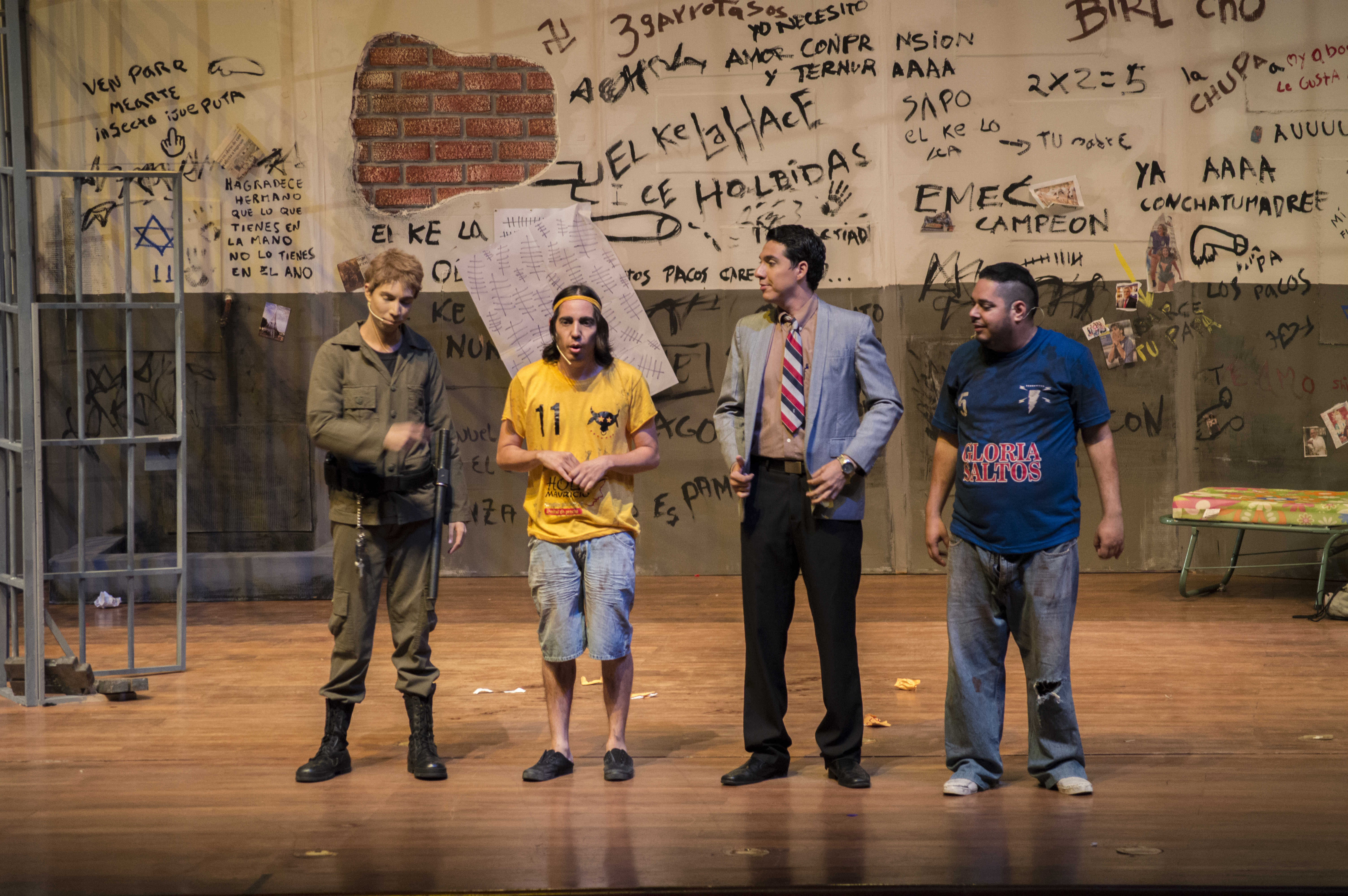 El grupo de teatro Actantes con su obra "Al sur del pozo" puesta en escena en el Teatro Centro Cívico el 17 de octubre de 2014, con Alex Vizuete en la izquierda externa, Víctor Aráuz en la izquierda interna, Ney Calderón en la derecha interna y Fernando García en la derecha externa.